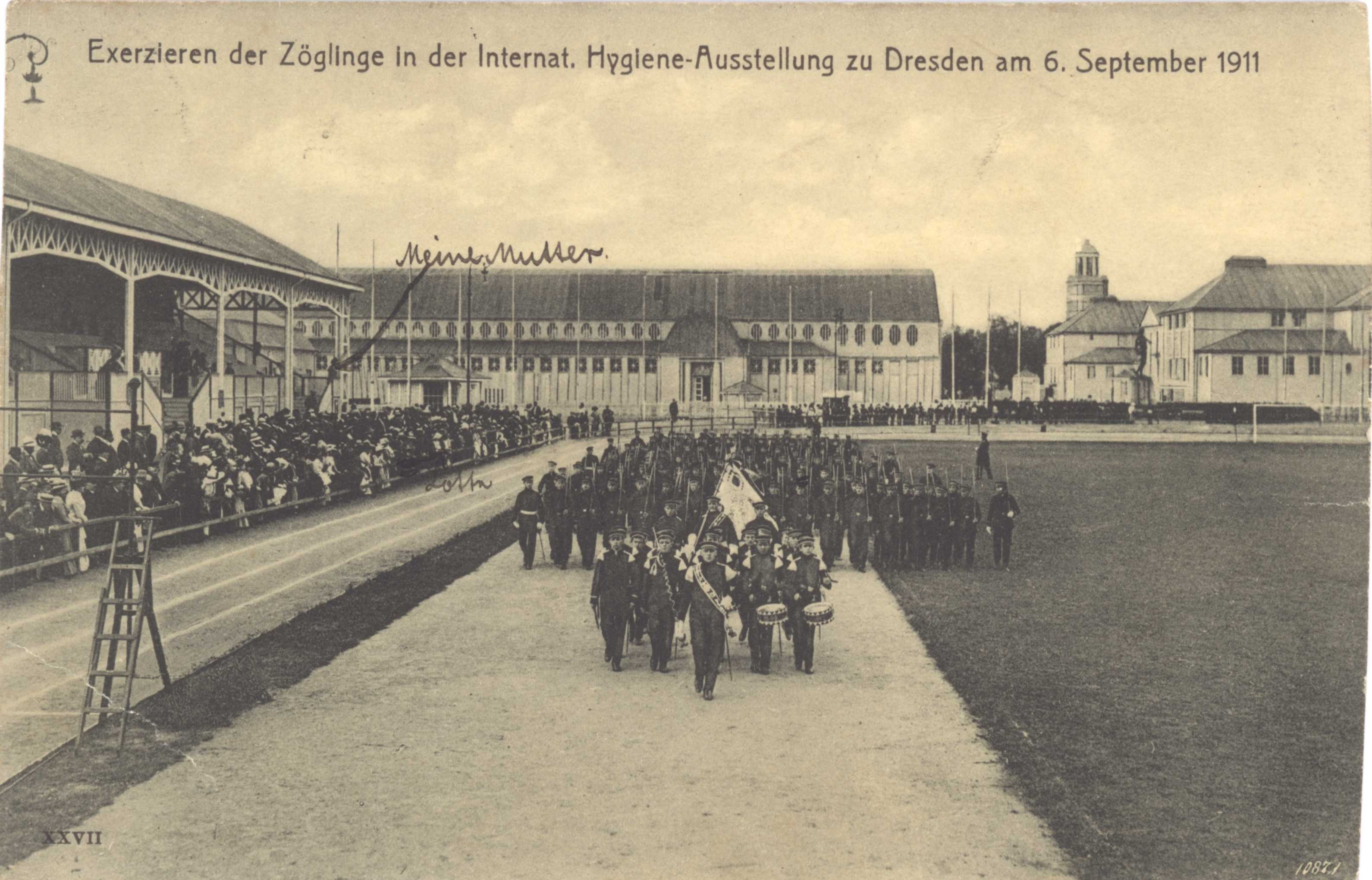 Schüler exerzieren auf dem Gelände des Städtischen Ausstellungspalastes (gedruckte Beschriftung auf der Rückseite: Freimaurerinstitut Lehr- und Erziehungsanstalt für Knaben zu Dresden-Striesen Öffentliche Realschule)